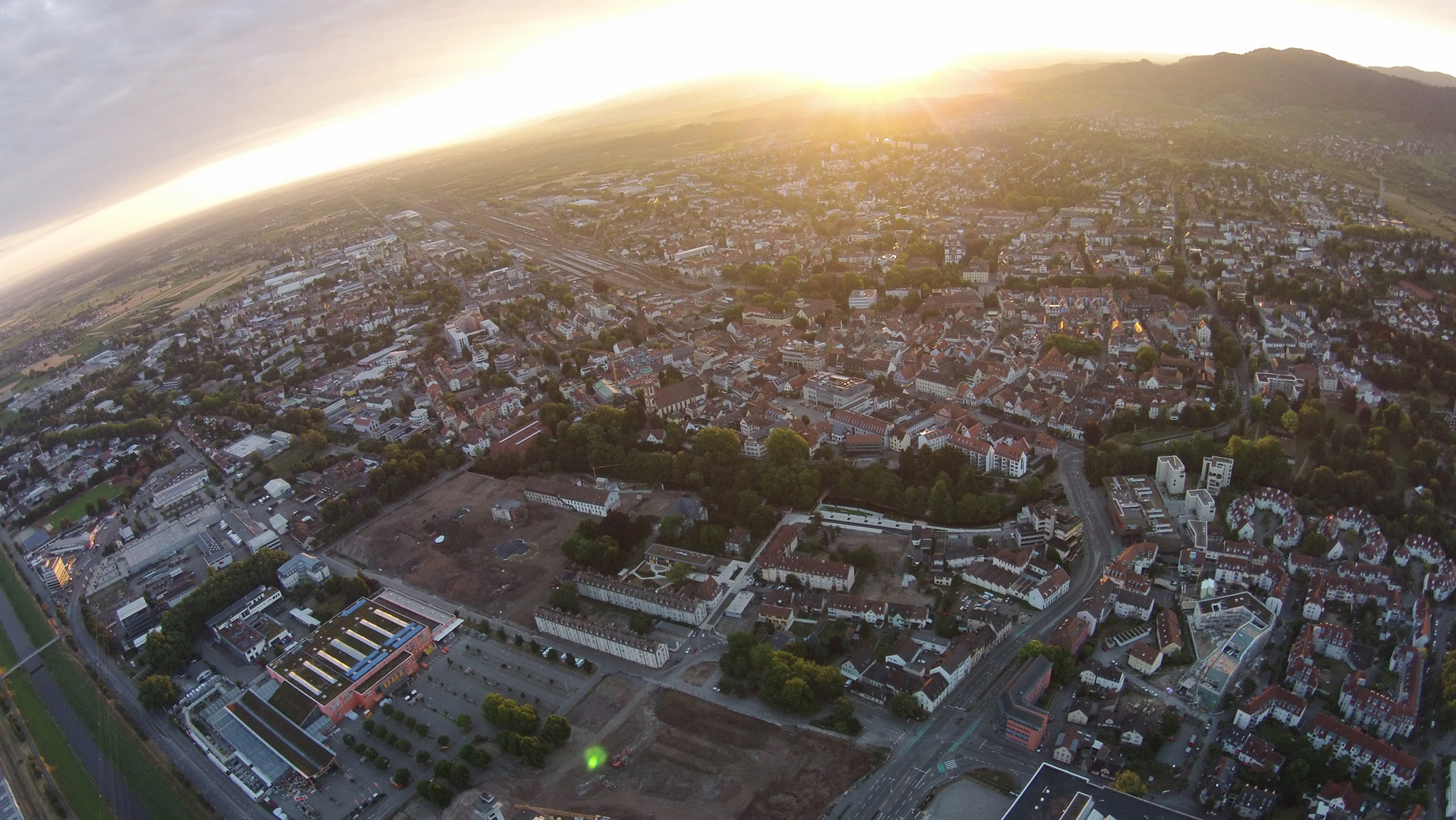 Diese Aufnahme von Offenburg wurde am 06.07.2014 aus ca. 280 Metern Höhe in der Nähe der Messe Offenburg-Ortenau aufgenommen. Es zeigt Offenburg im Vordergrund mit einem Sonnenaufgang am Rande des Schwarzwalds.